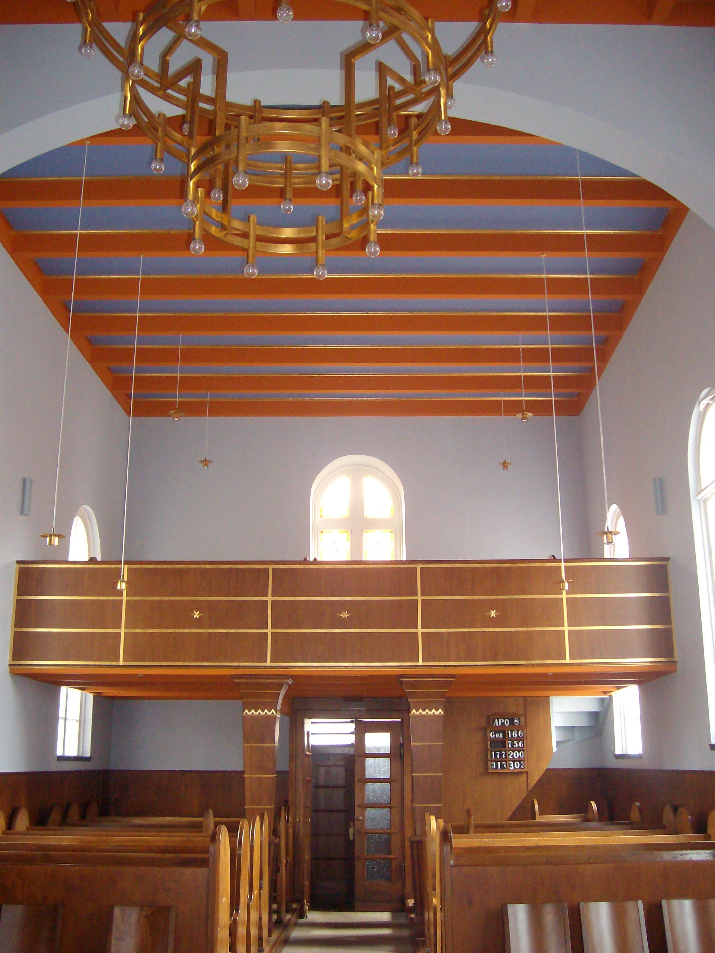 Ostflügel der Kirche in Jemgum, Ostfriesland